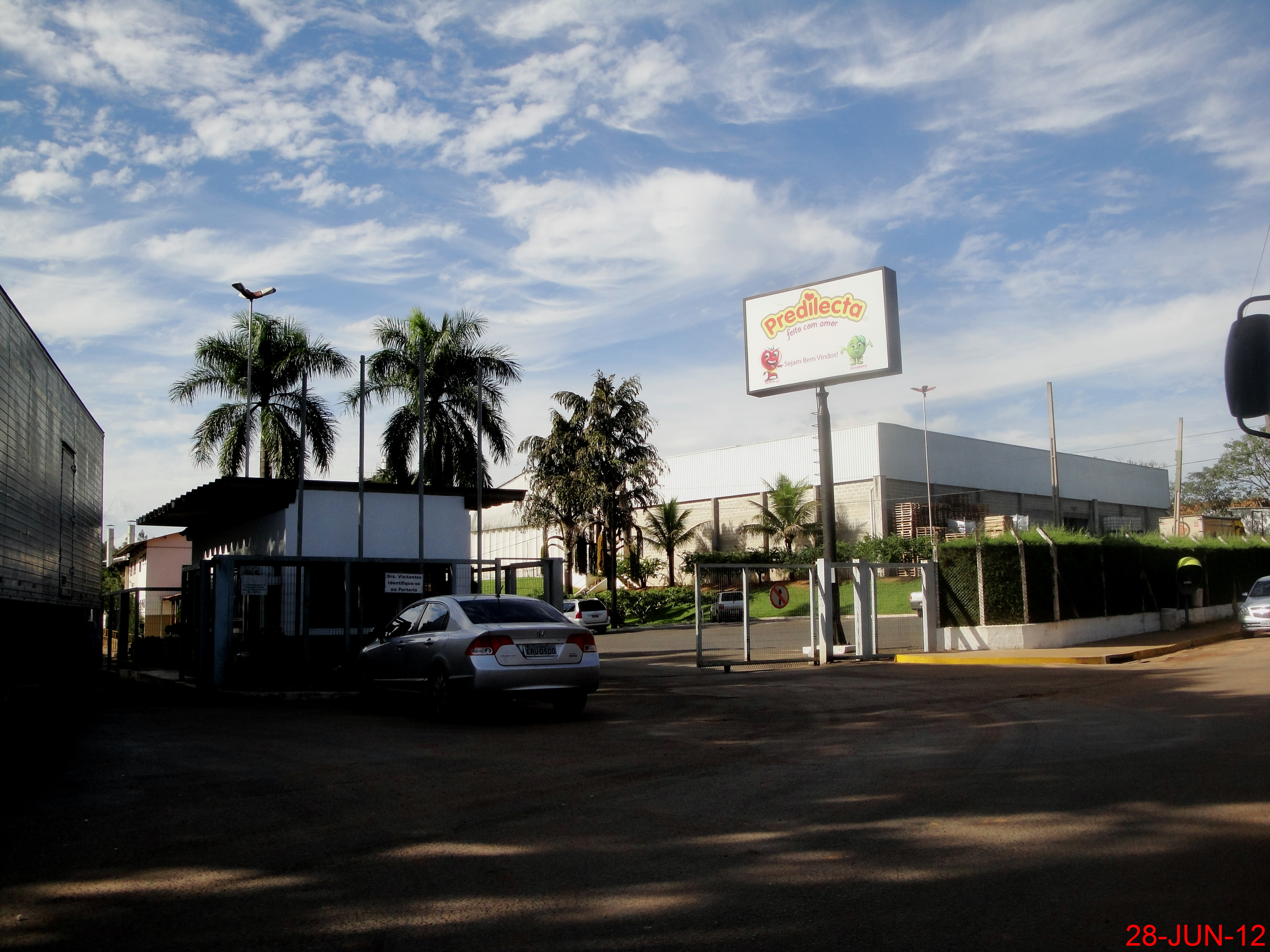 Fábrica da Predilecta em São Lourenço do Turvo. A empresa gera mais de 1.300 empregos diretos e aproximadamente 5.000 empregos indiretos.